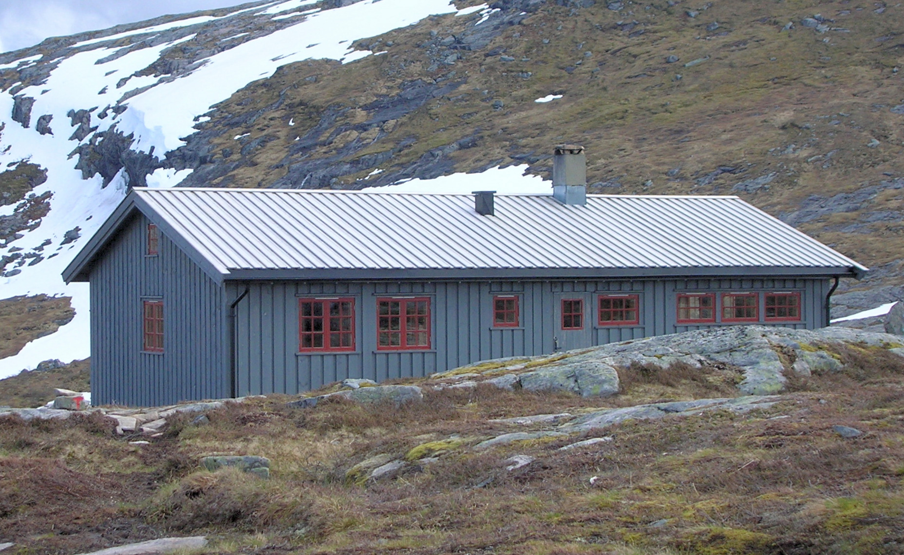 Storfiskhytta, turisthytte i Møre og Romsdal (Cabin in Norway)